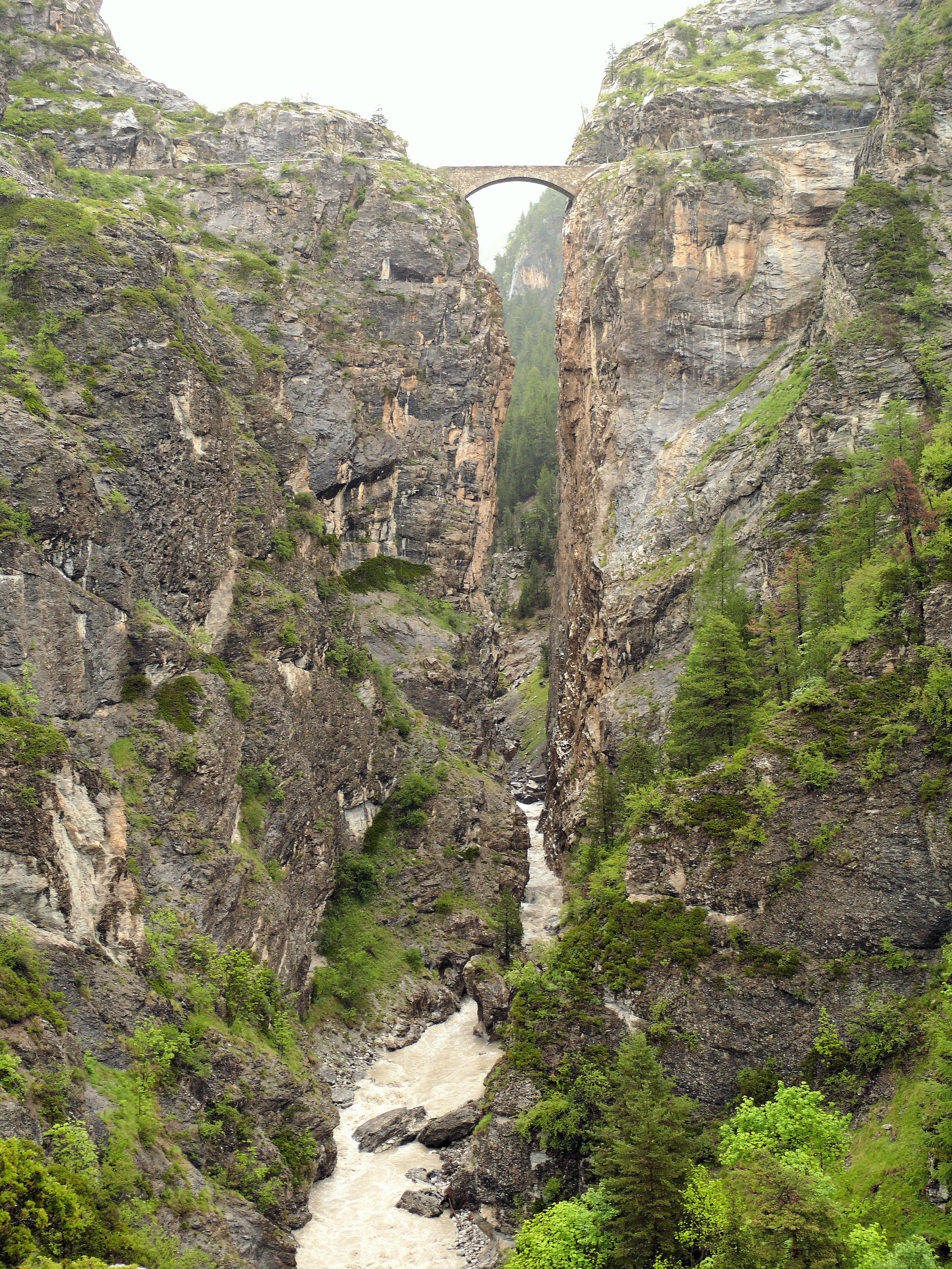 Saint-Paul-sur-Ubaye - Pont du Châtelet au-dessus de l'Ubaye construit pour aller à Fouillouse